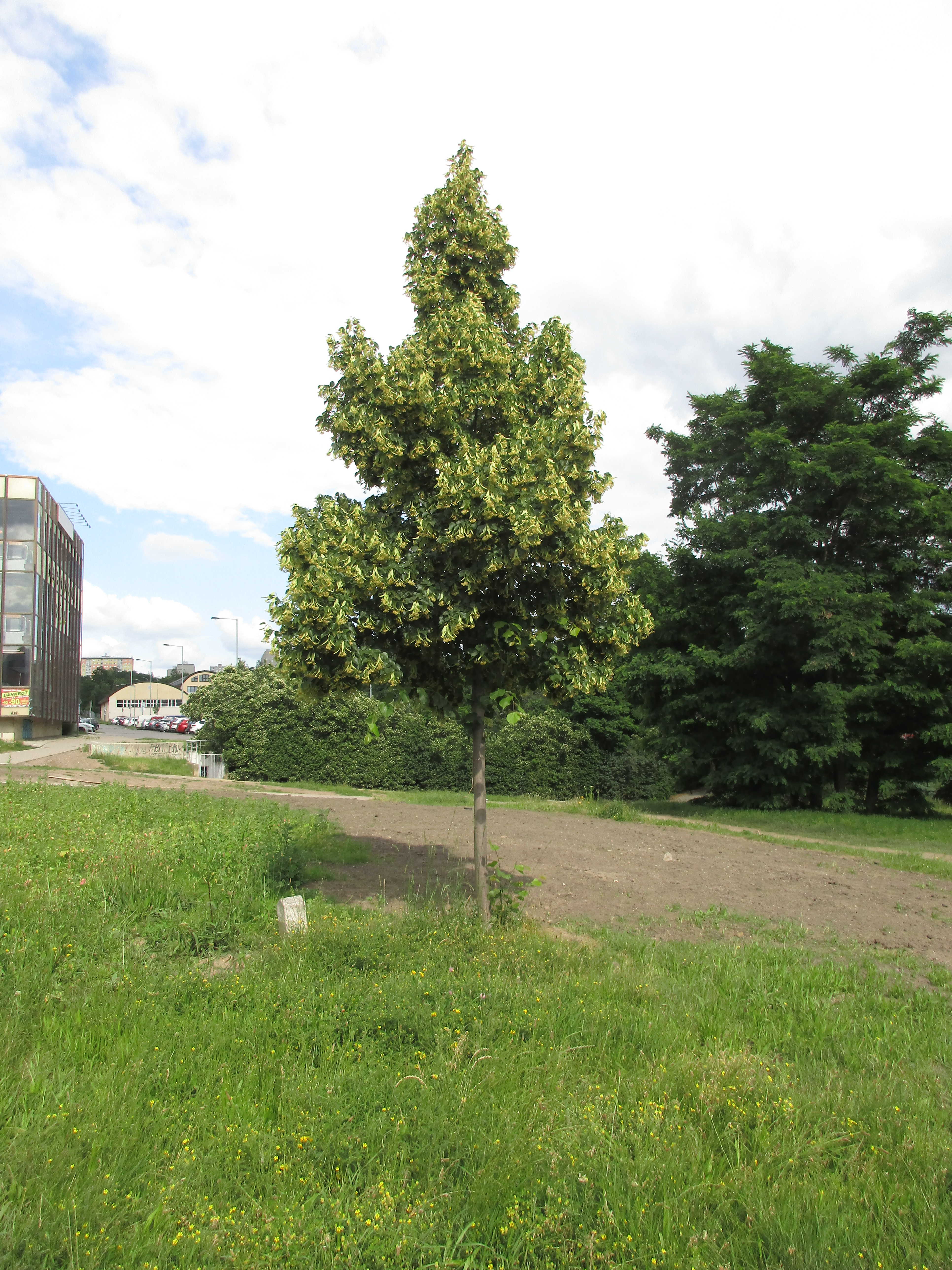 Lípa malolistá (Tilia cordata). Praha 4 - Modřany, Sofijské náměstí. Vysazena roku 2008 na památku 90. výročí vzniku Československé republiky.